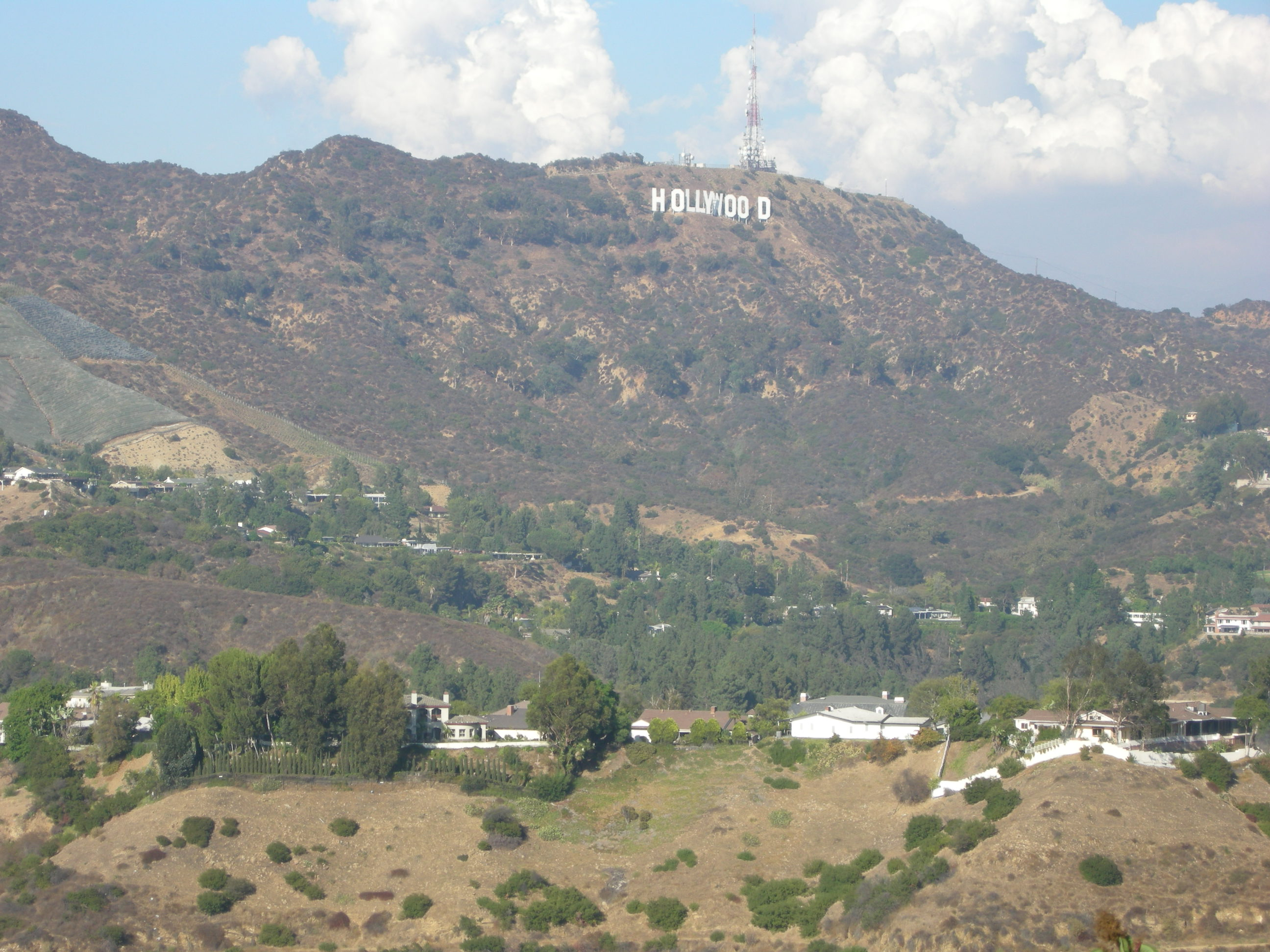 Hollywood sign